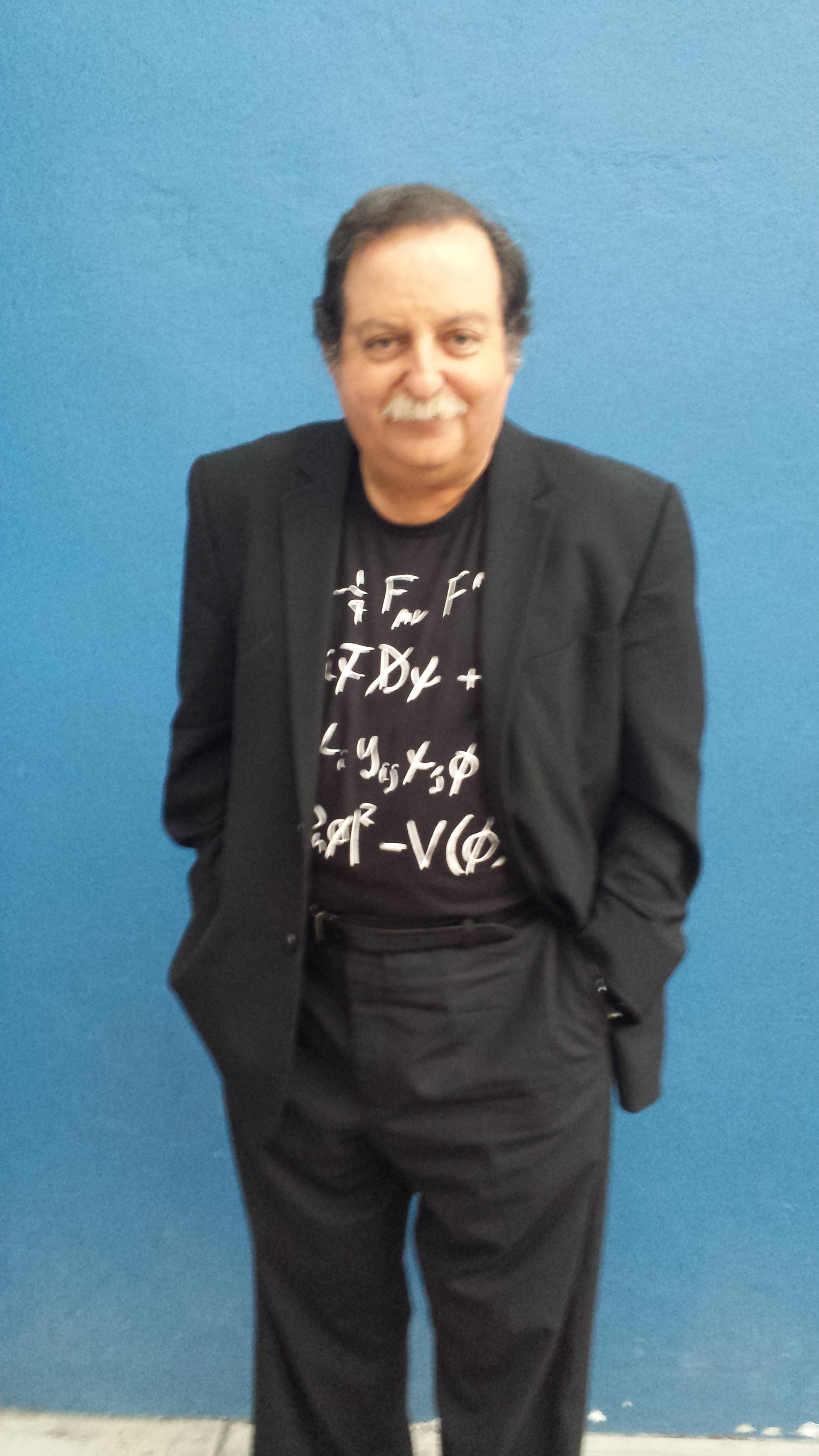 Novelista, ensayista, traductor y periodista cultural mexicano.